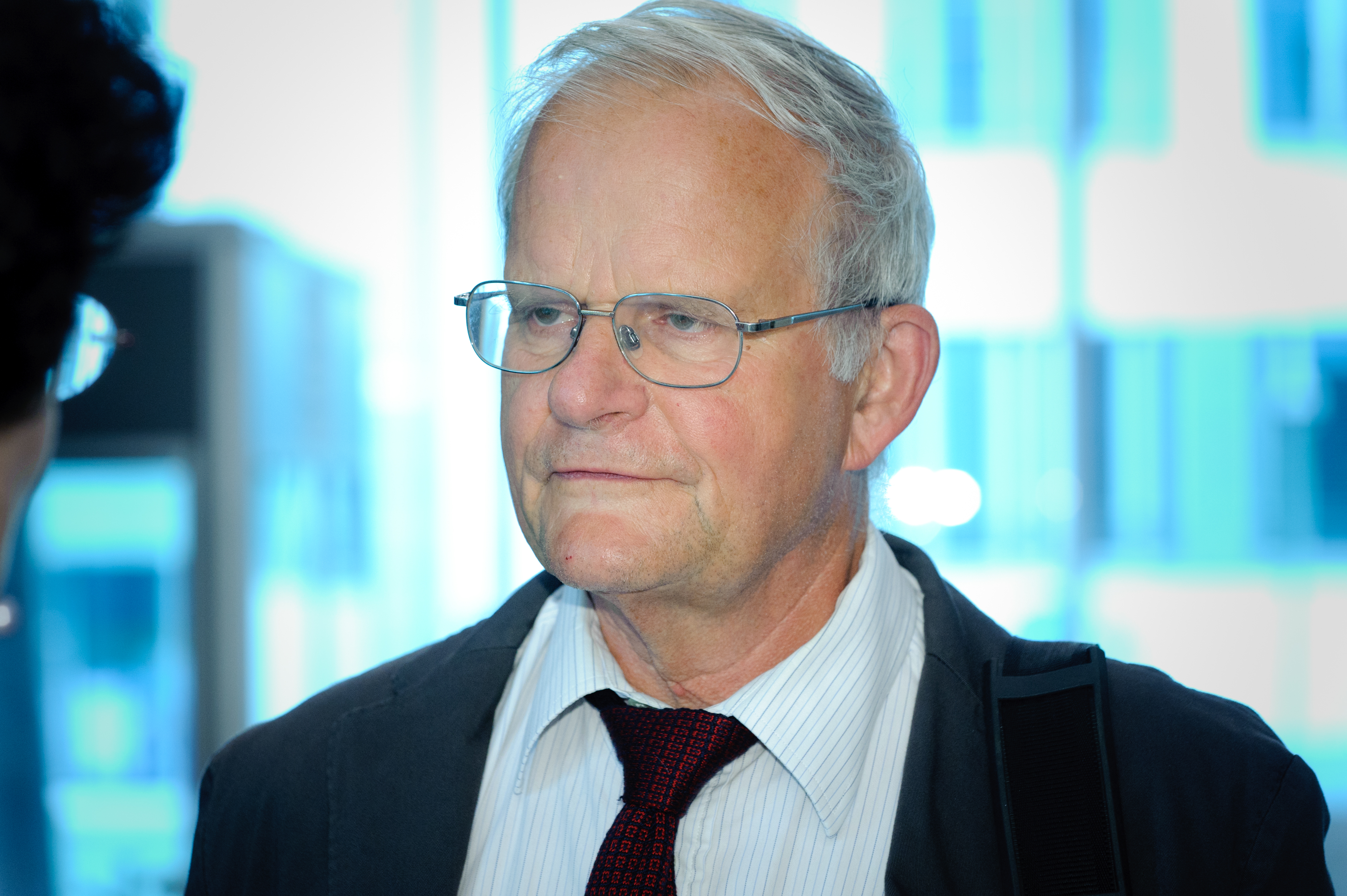 Hans Jörg Elshorst (Moderator) Foto: Stephan Röhl